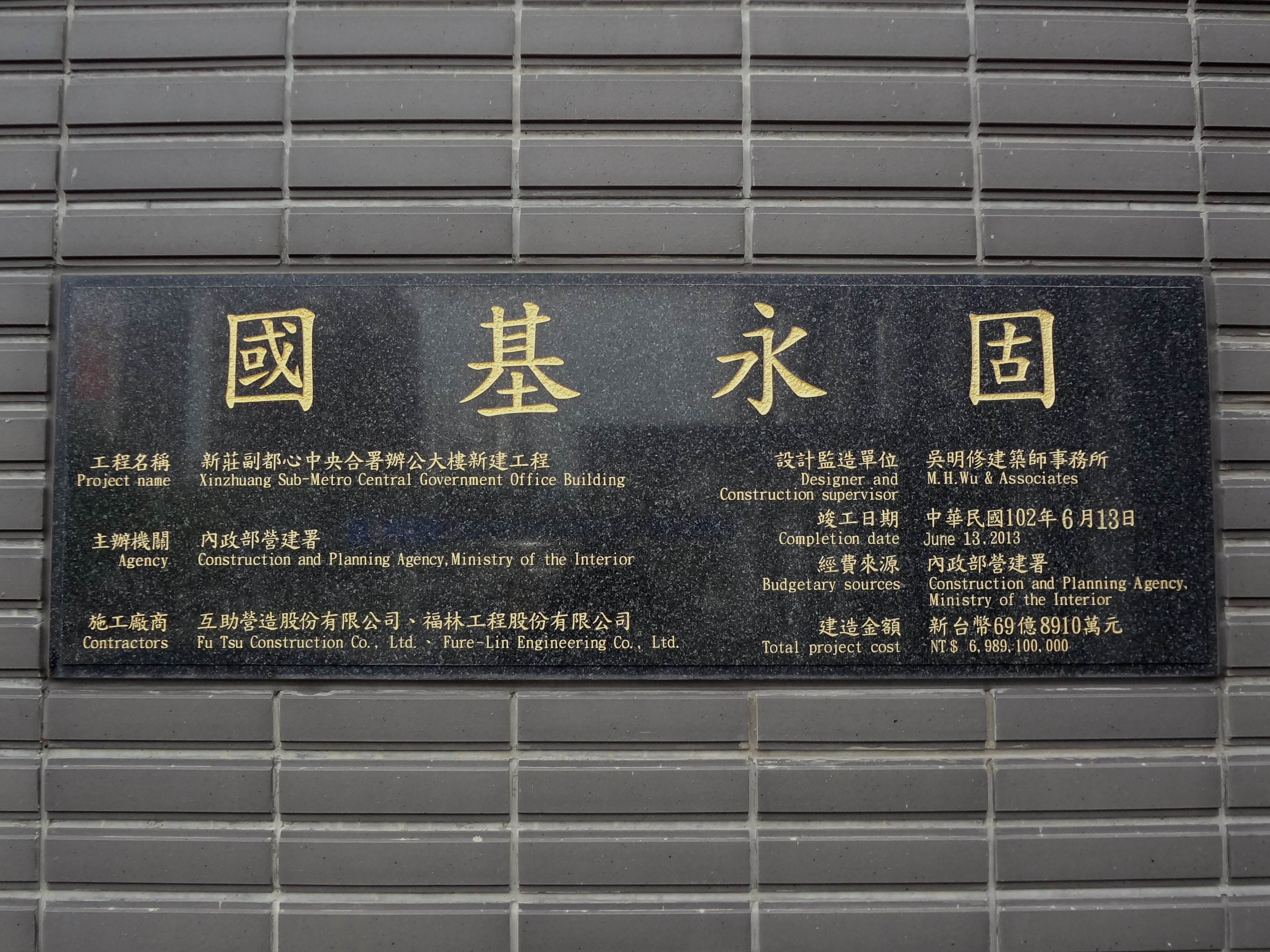 行政院新莊聯合辦公大樓竣工銘牌，位於南棟外牆。